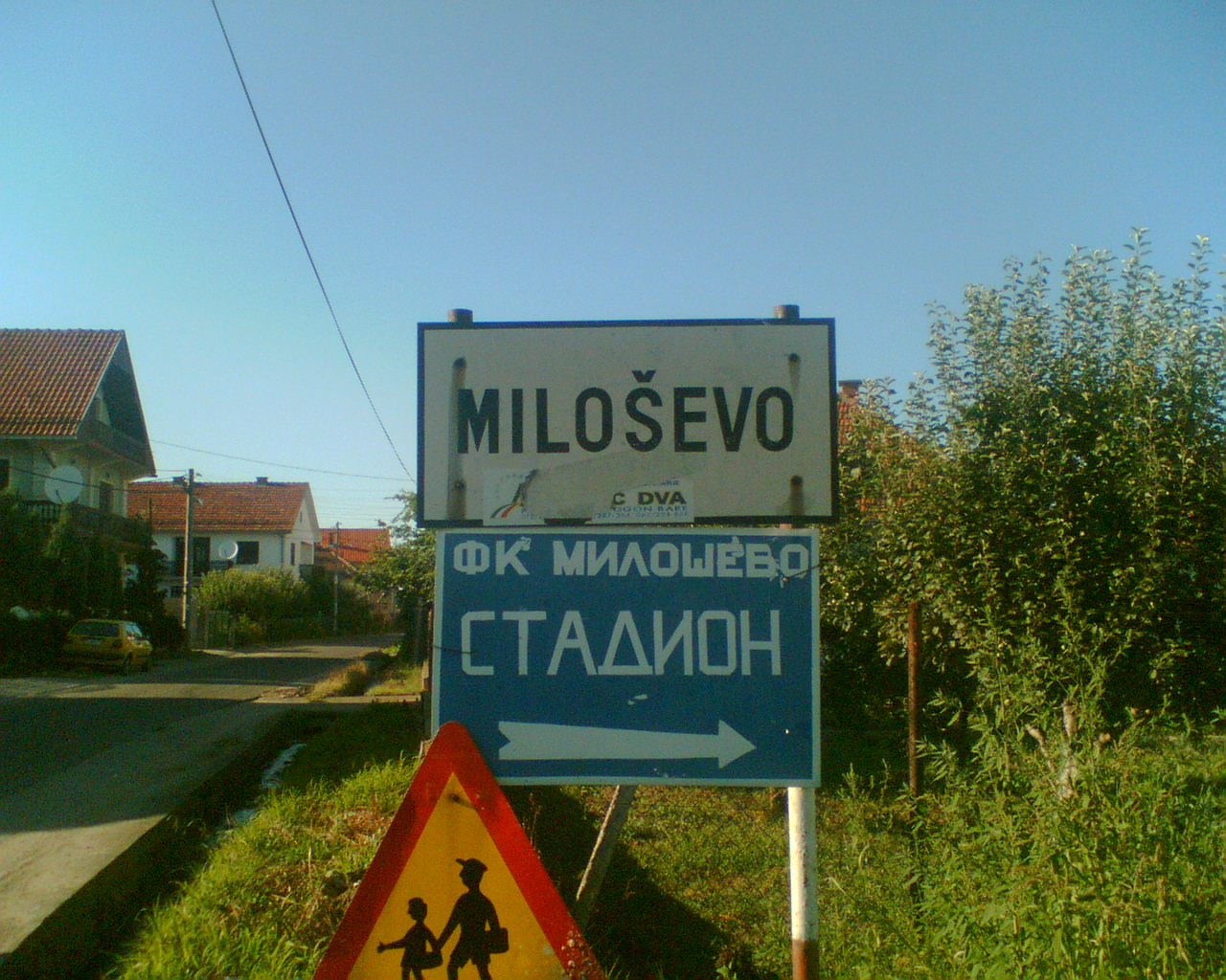 Miloševo.